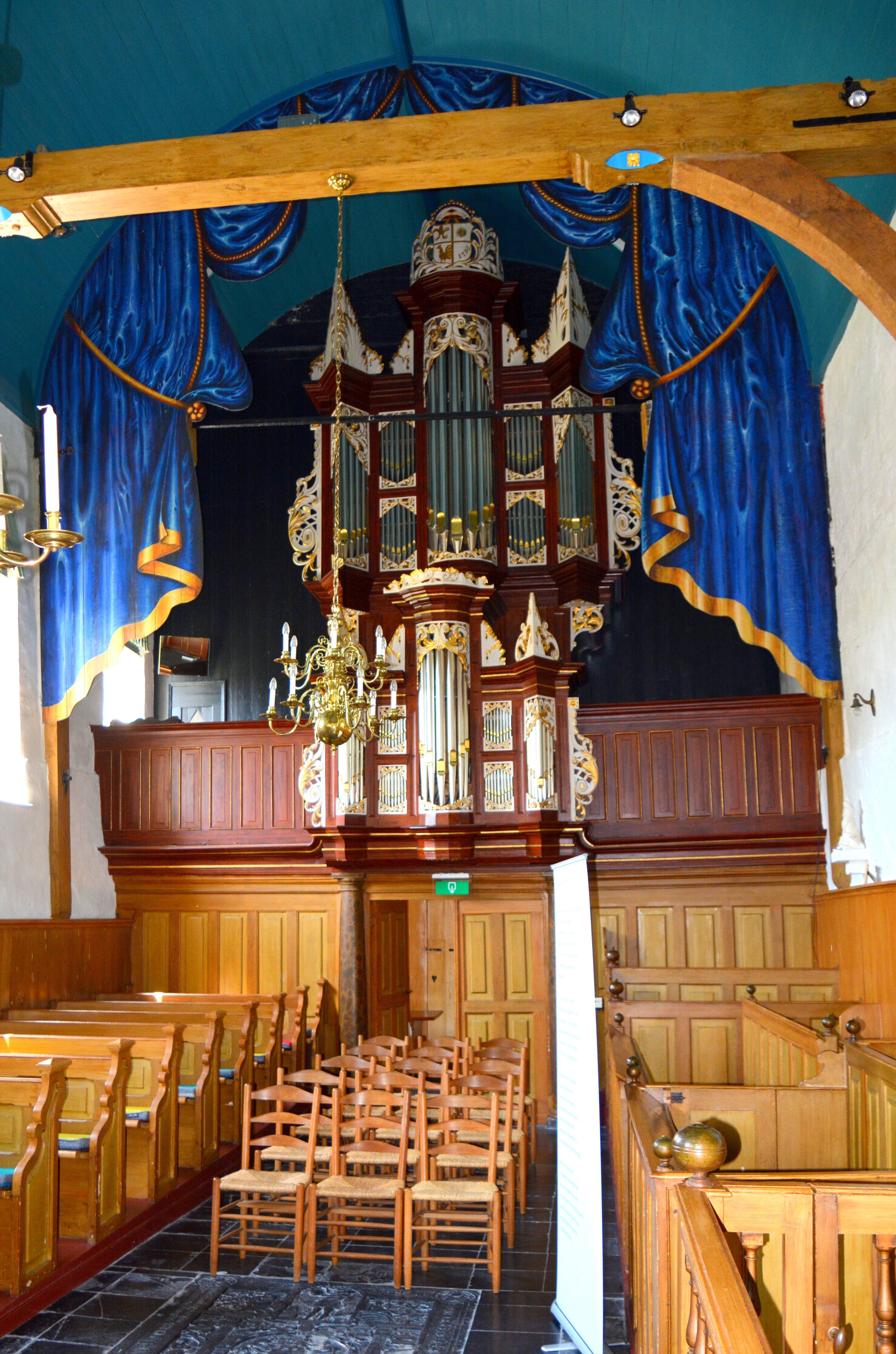 Boksum, Sint-Margrietkerk, orgel